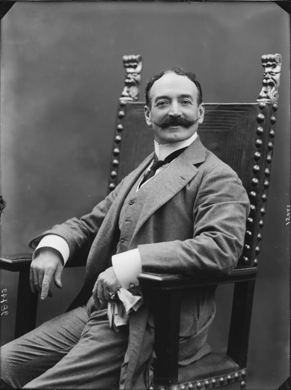 Andrea Landini fotografato da Mario Nunes Vais